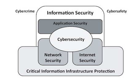 Монгол: Кибер аюулгүй байдал ба аюулгүй байдлын бусад салбаруудын хоорондын хамаарал